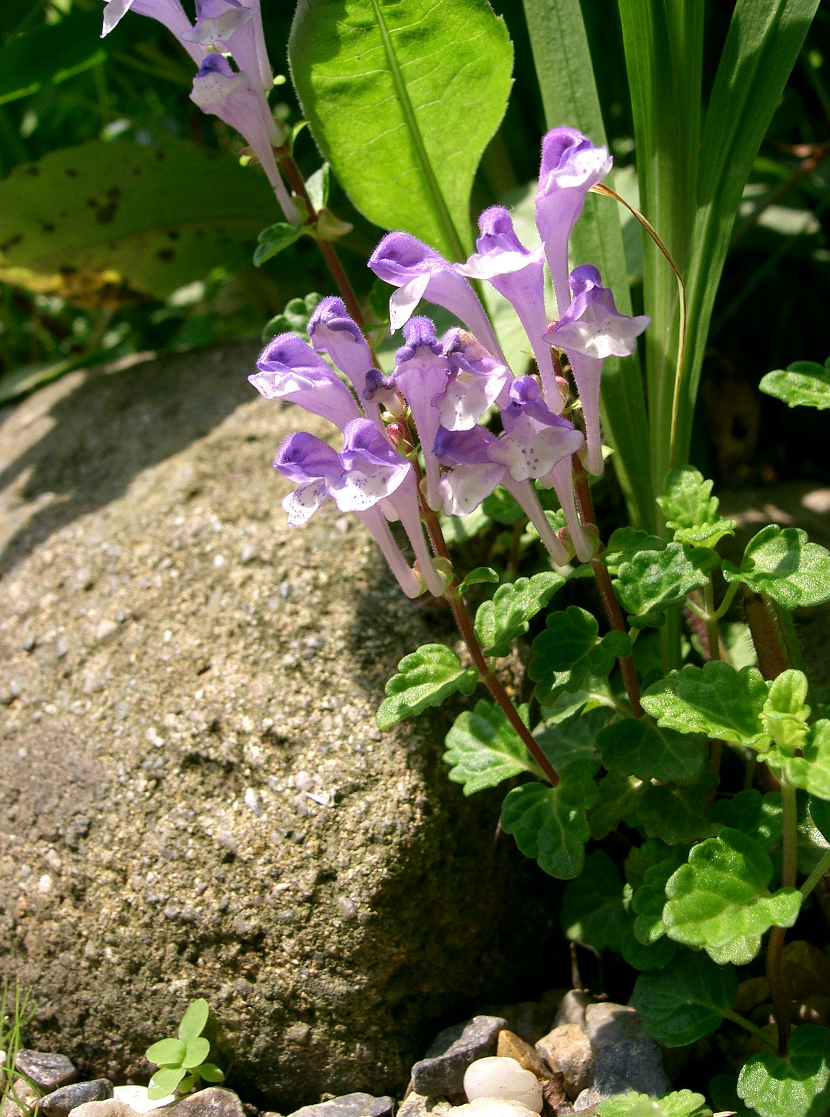 Scutellaria sp.